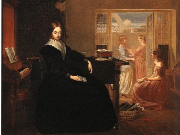 картина «Гувернантка» (The Governess или The Poor Teacher)